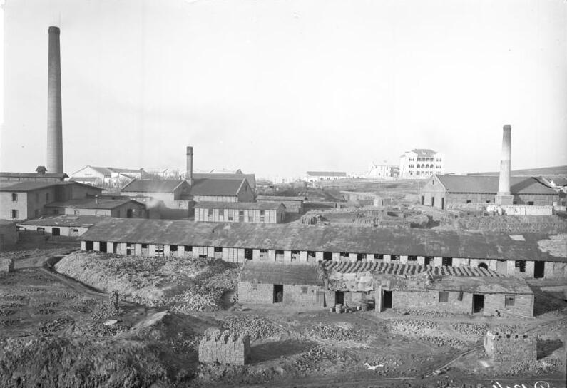 Schutzgebiet Kiautschou Tsingtau 1910: Ziegelei Diederichsen u. Co.